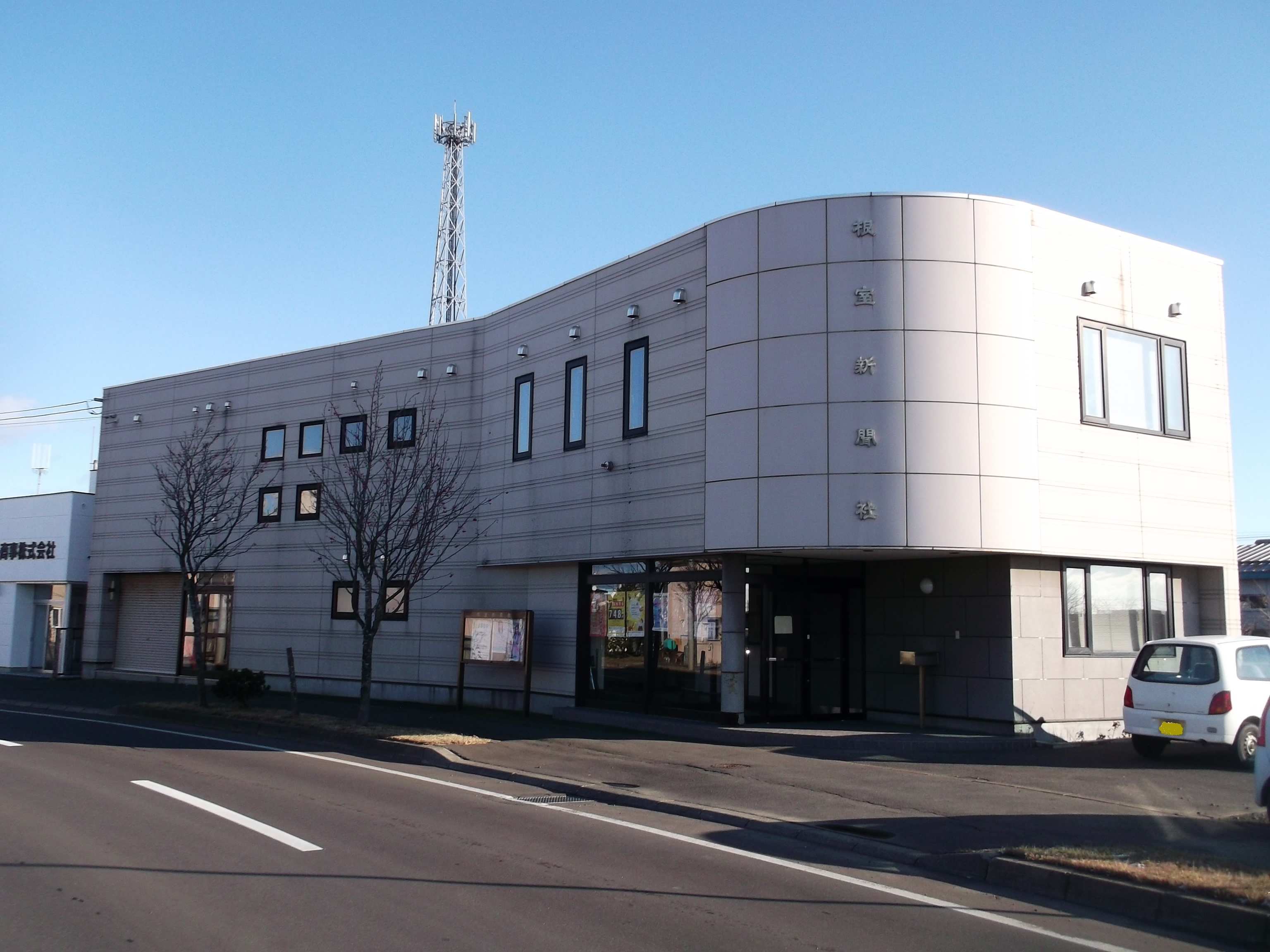 根室新聞社本社